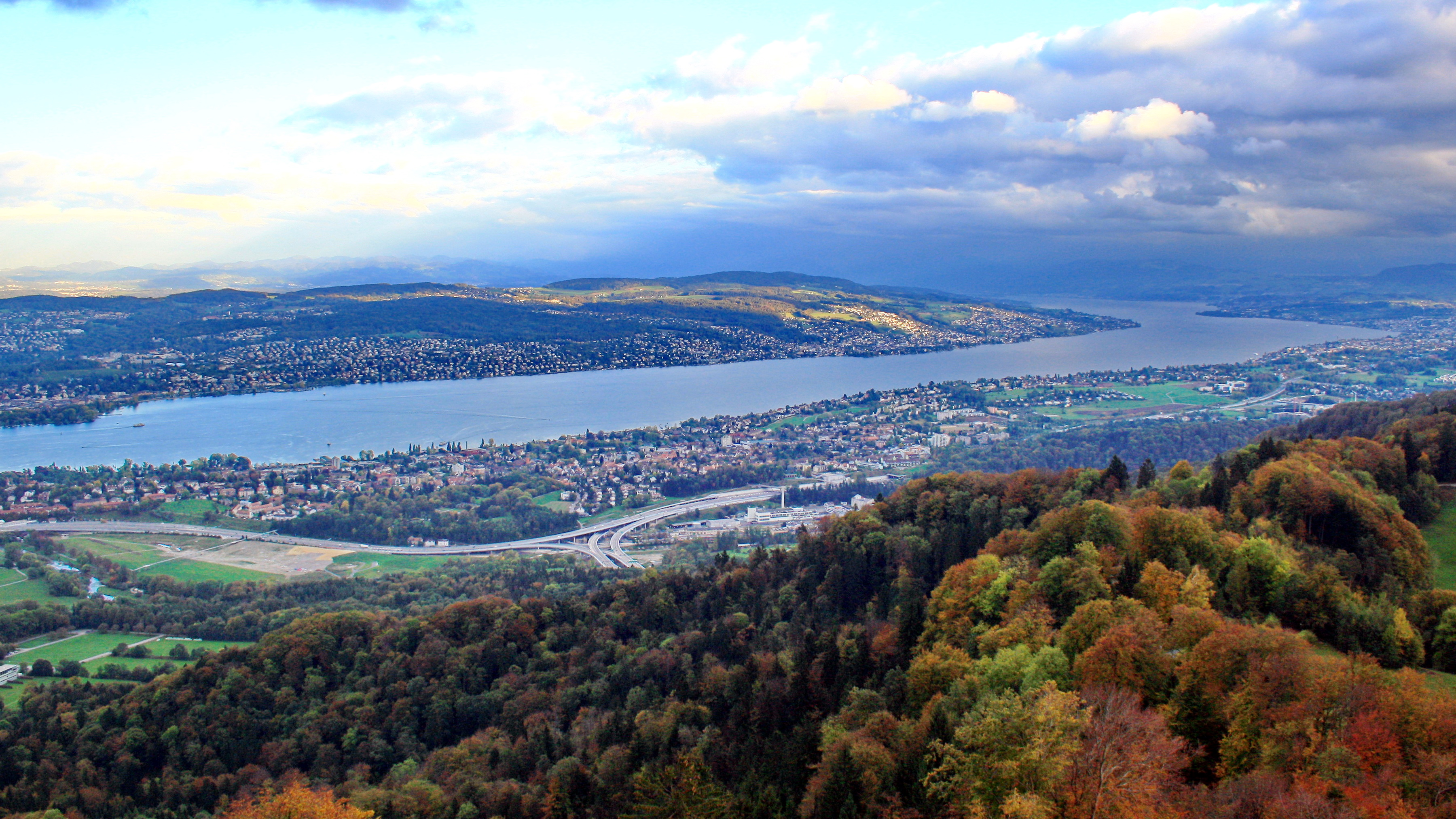 Pfannenstiel and Zürichsee (Lake Zürich) as seen from Aussichtsturm